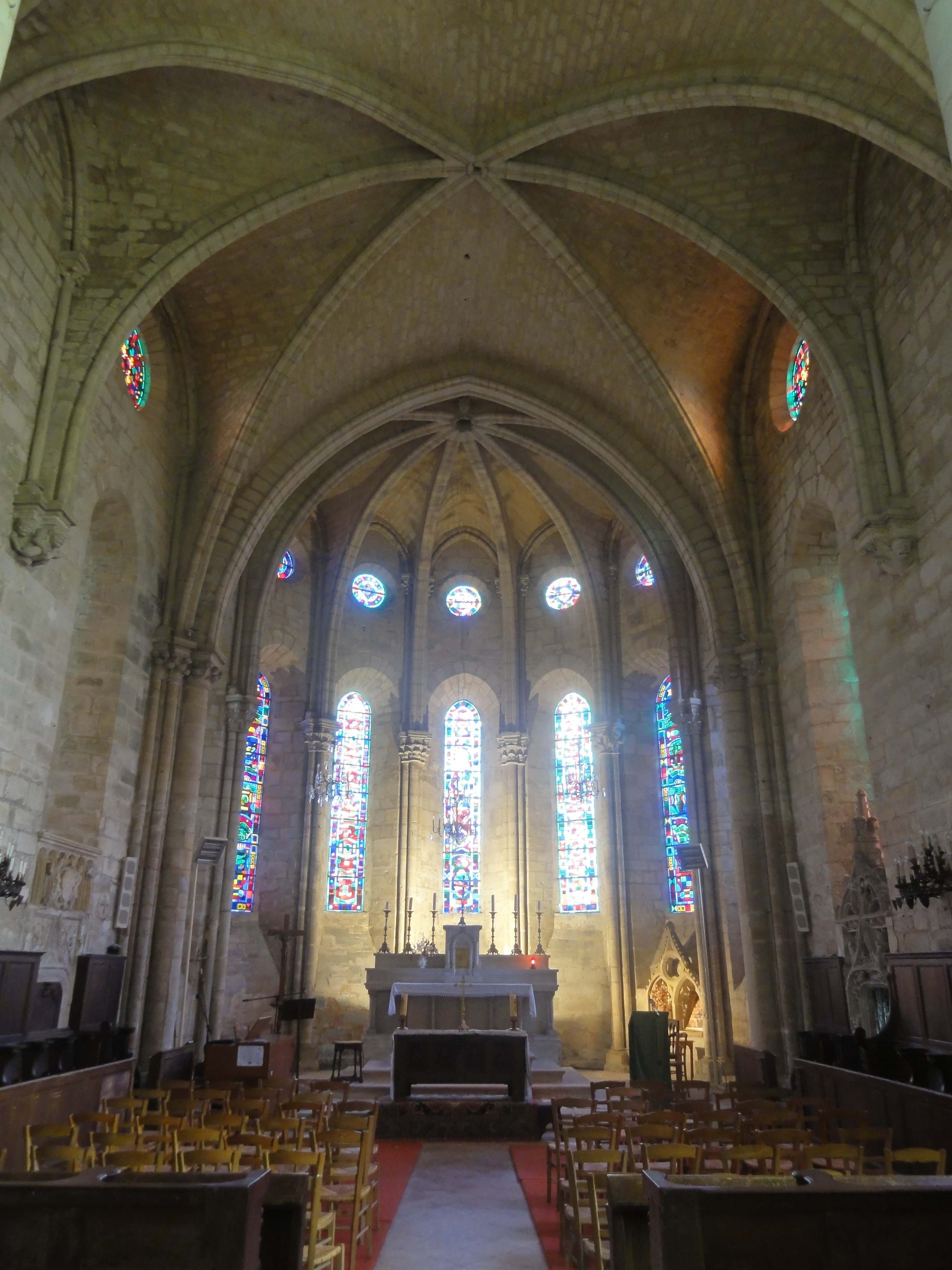 Chœur, vue vers l'est.